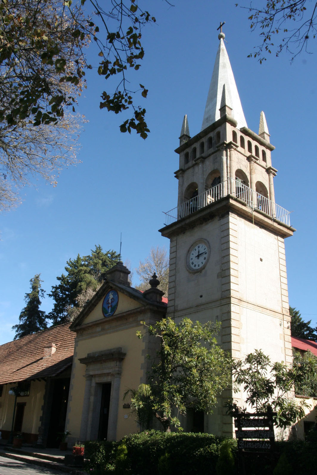 Una Hermosa hacienda del siglo XVII situada en el valle de Huasca en el Estado de Hidalgo, sede de inigualables paisajes y bellas construcciones historicas. Hacienda que perteneció a Don Pedro Romero de Terreros, Conde de Regla, hombre de negocios español que se dedicó a la explotación de minas en su mayoría oro y plata, para que después fueran enviados a España. Siendo el conde uno de los hombres más ricos de su tiempo. Así mismo el nombre de la Capilla San Miguel Arcangel fué otorgado también por el Conde, ya que a la par, era devoto de San Miguel Arcangel, quien según la tradición de las Iglesias, es el jefe de los ejércitos de Dios.